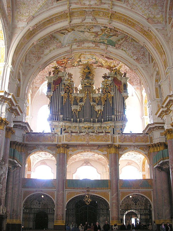 Klosterkirche Fürstenfeldbruck (Oberbayern). Innenraum nach Westen, Blick zu Orgelempore. Eigene Aufnahme, Jan 2007 / Fürstenfeldbruck monastery (Upper Bavaria, Germany). The church. Interior, looking west to the organ. Own photo, Jan 2007